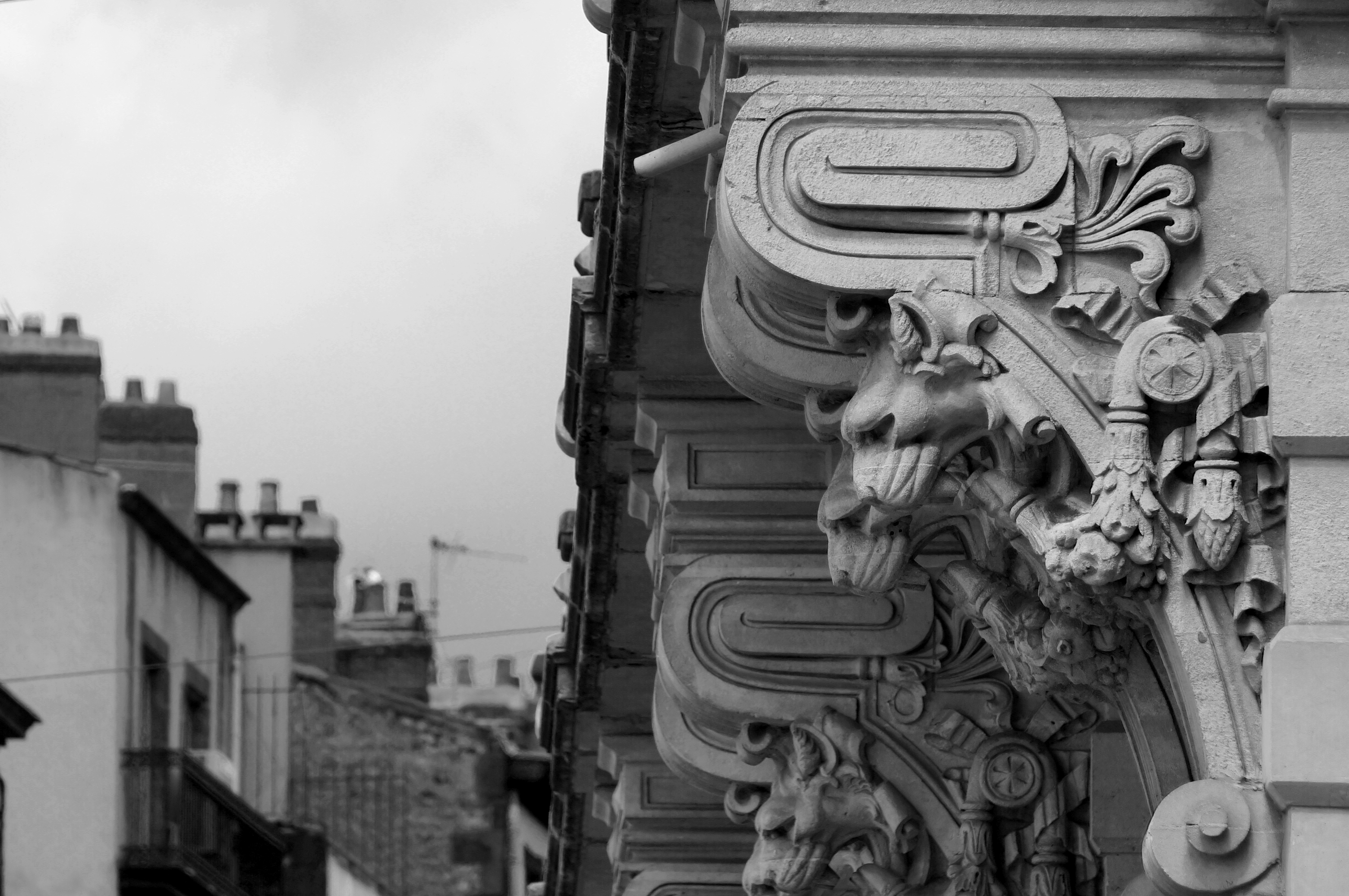 Cariatides - Opéra municipal de Clermont-Ferrand .